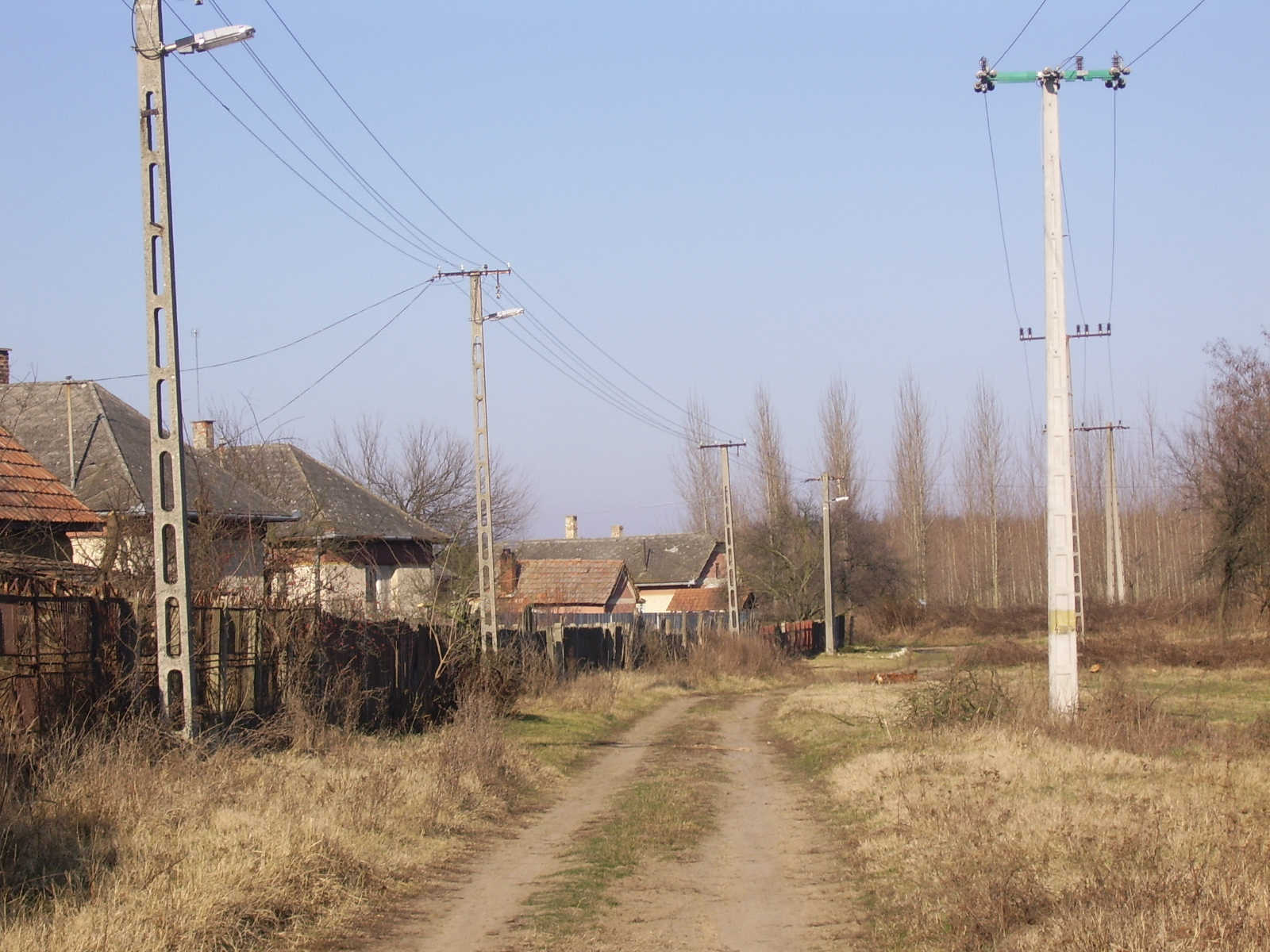 Egy házsor a Kismogyoróson (Balkány)